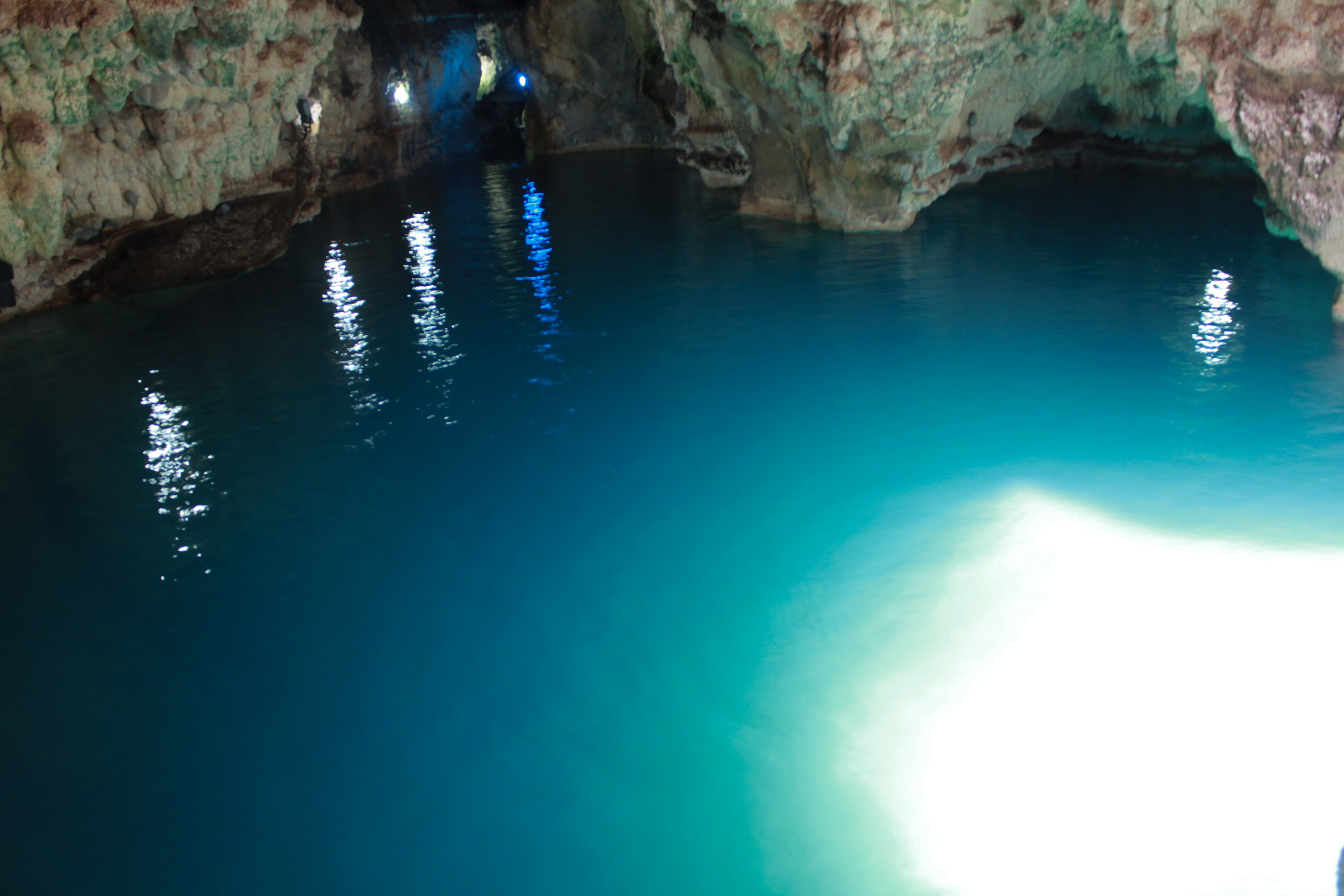 غار آبي سهولان